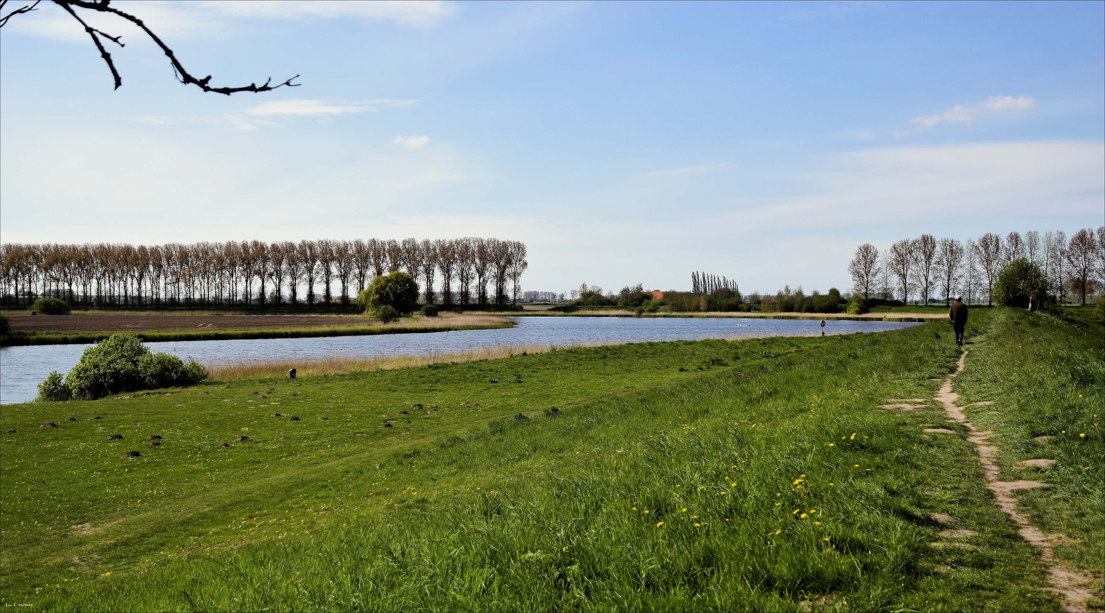 Boerekreek